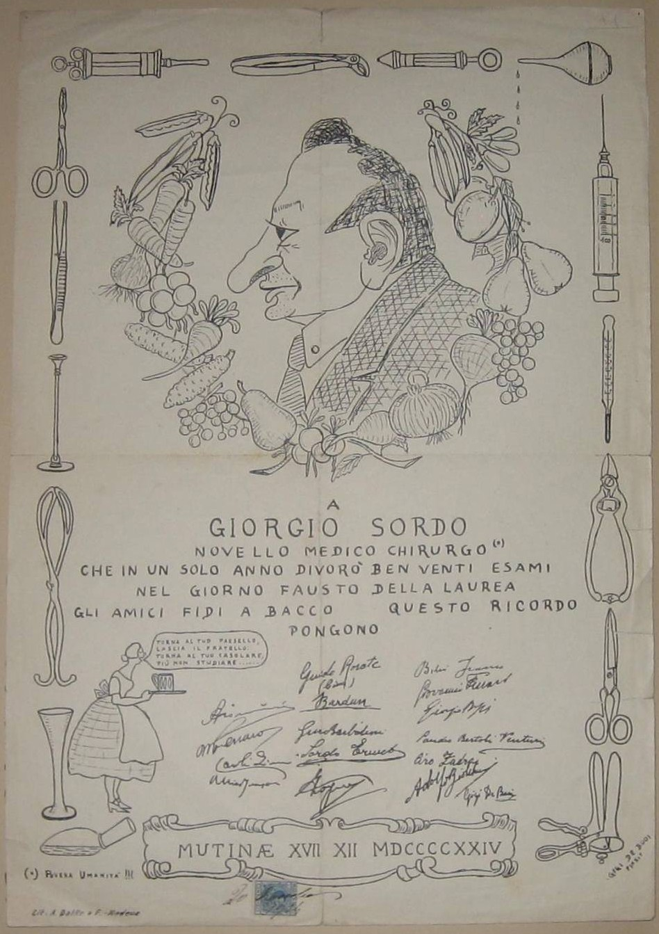 Papiro di laurea donné le 17 décembre 1924 à Modène.